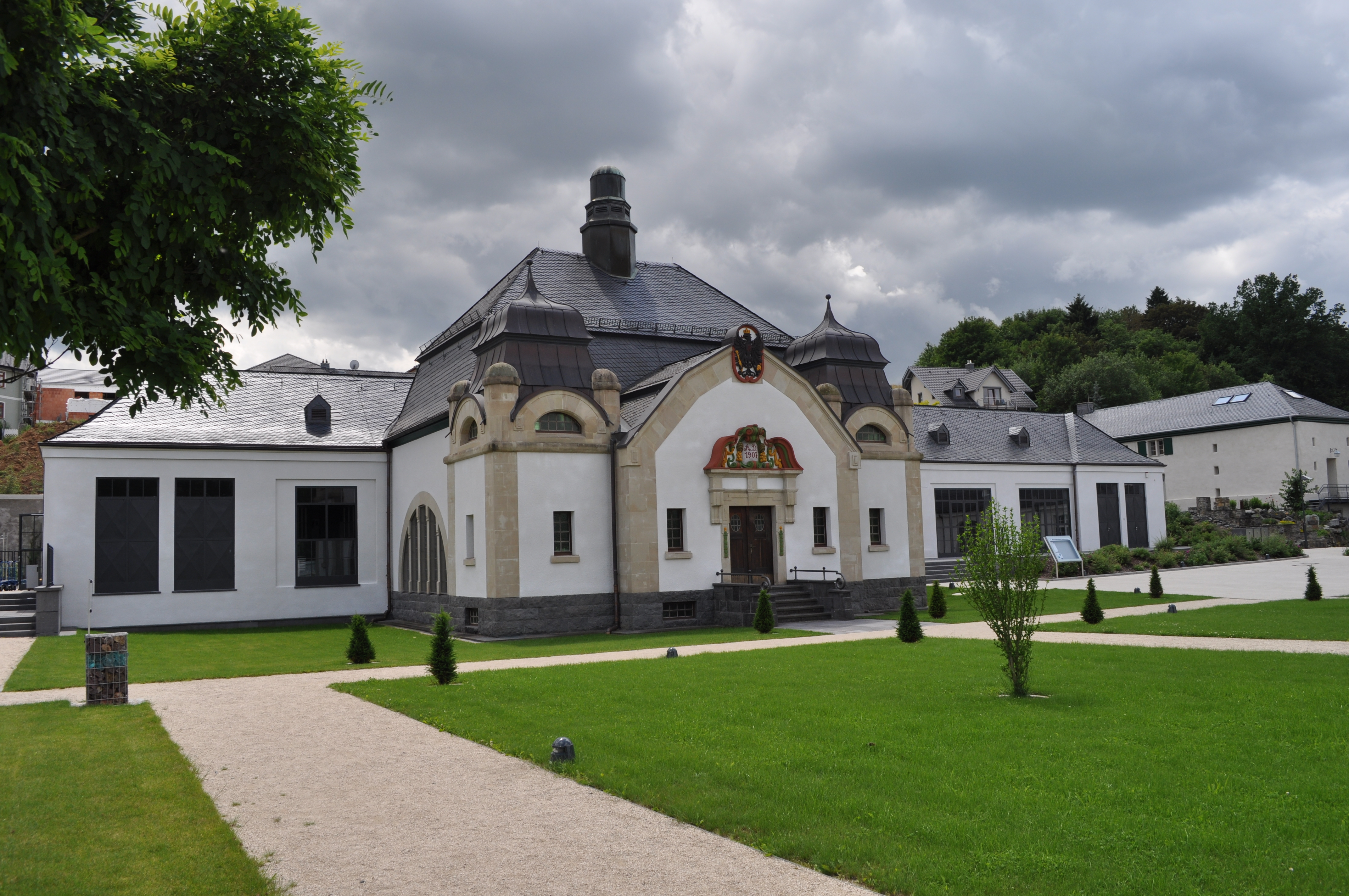 Niederselters, Seltersbrunnen, Totale